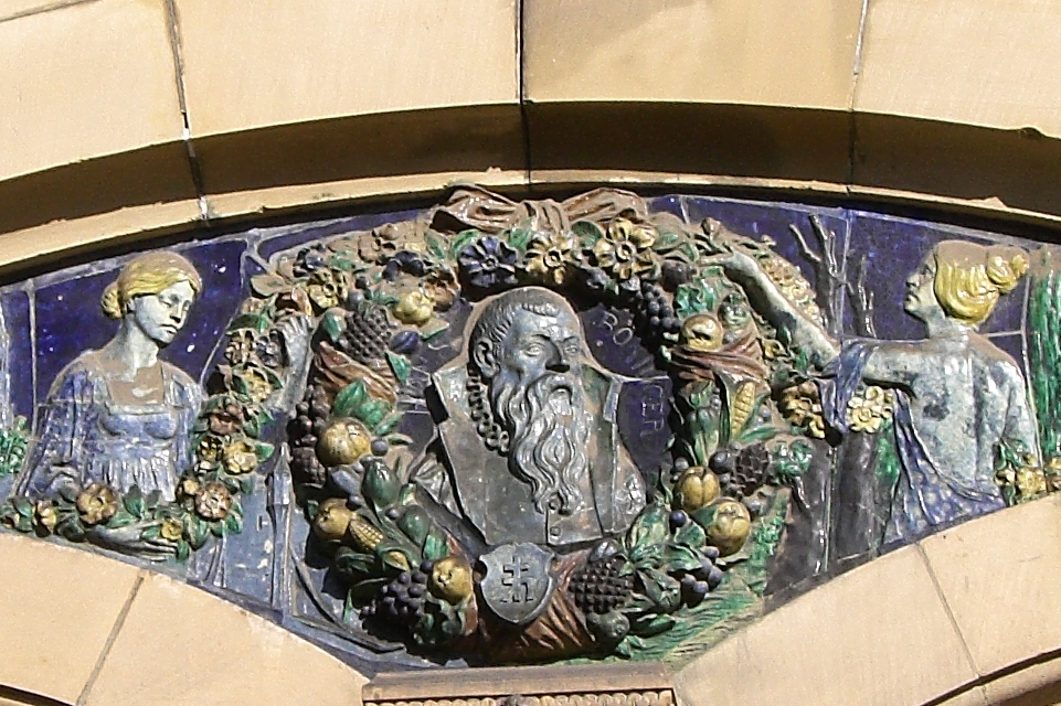 Detailaufnahme linker Gebäudeflügel